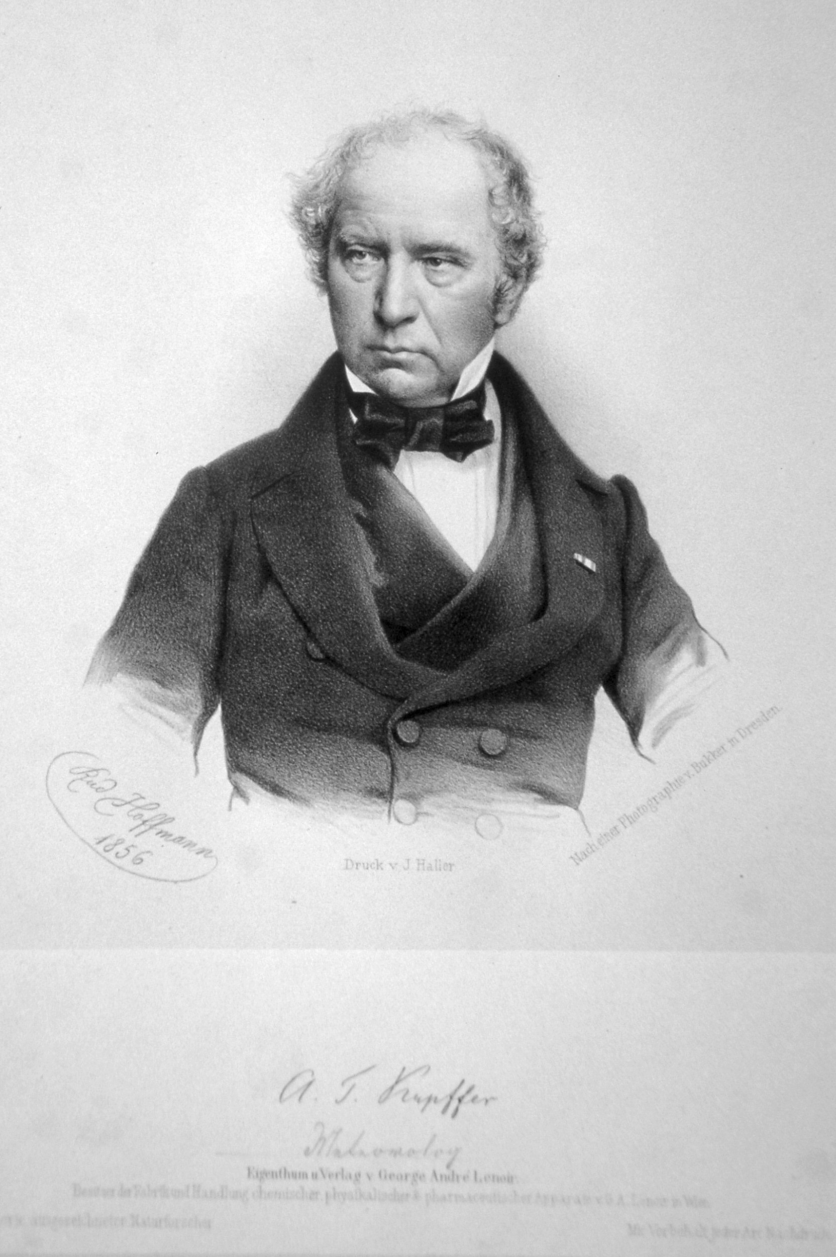 Adolpht Theodor Kupffer (1799-1865), deutscher Physiker und Chemiker. Lithographie von Rudolf Hoffmann, 1856. Nach einer Fotografie von Bukker.